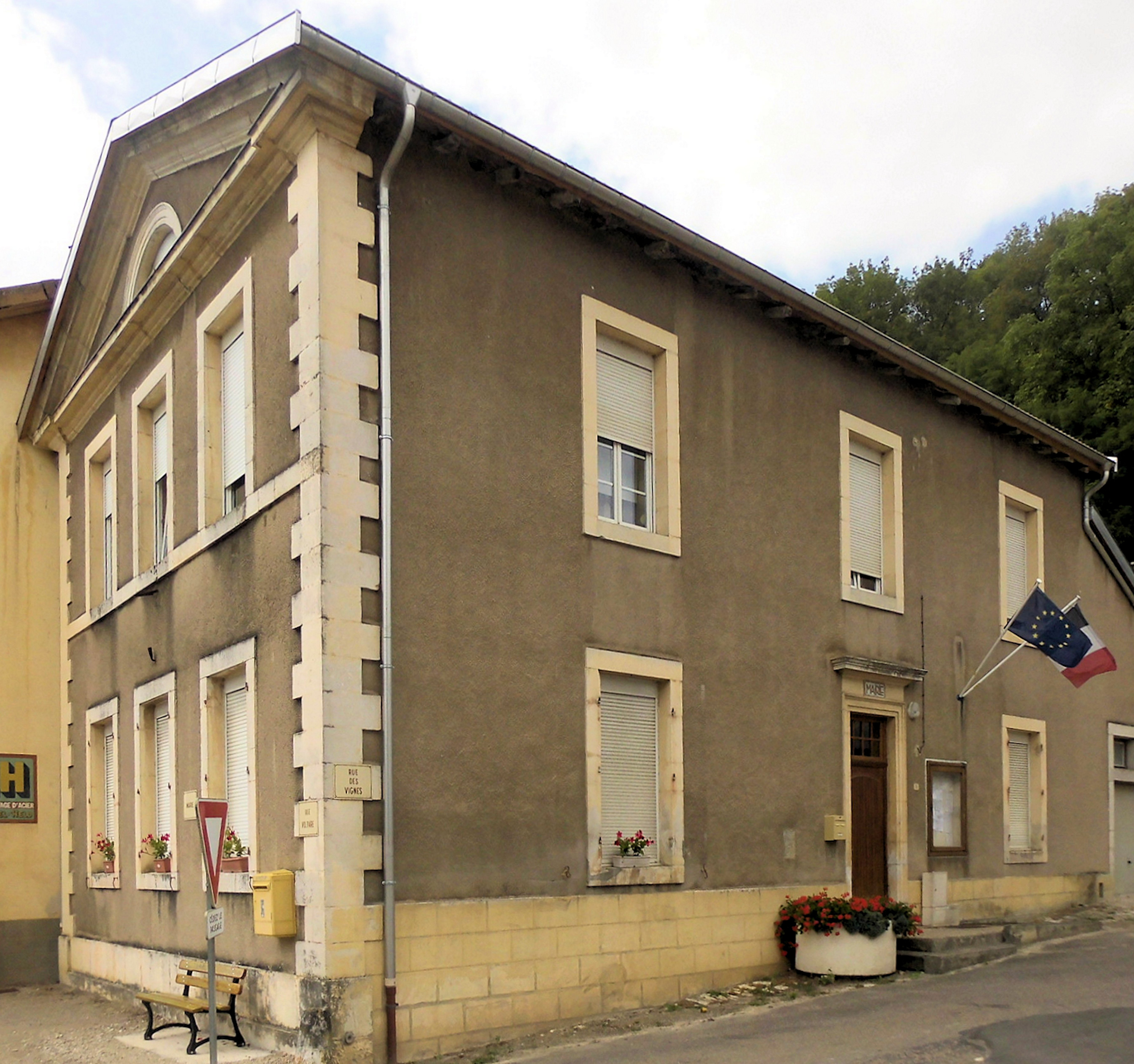 La mairie d'Harchéchamp